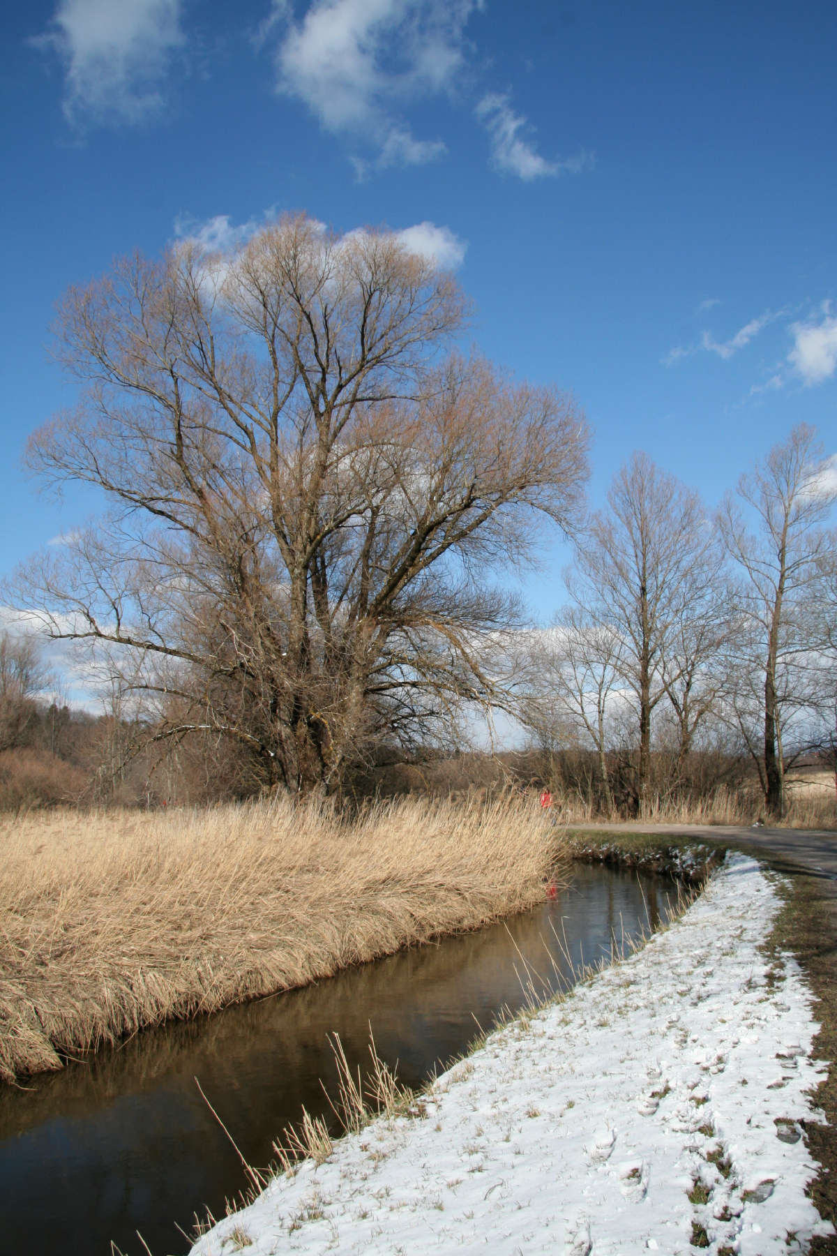 Die Ramsach im Murnauer Moos in der Nähe des Murnauer Ortsteils Ramsach